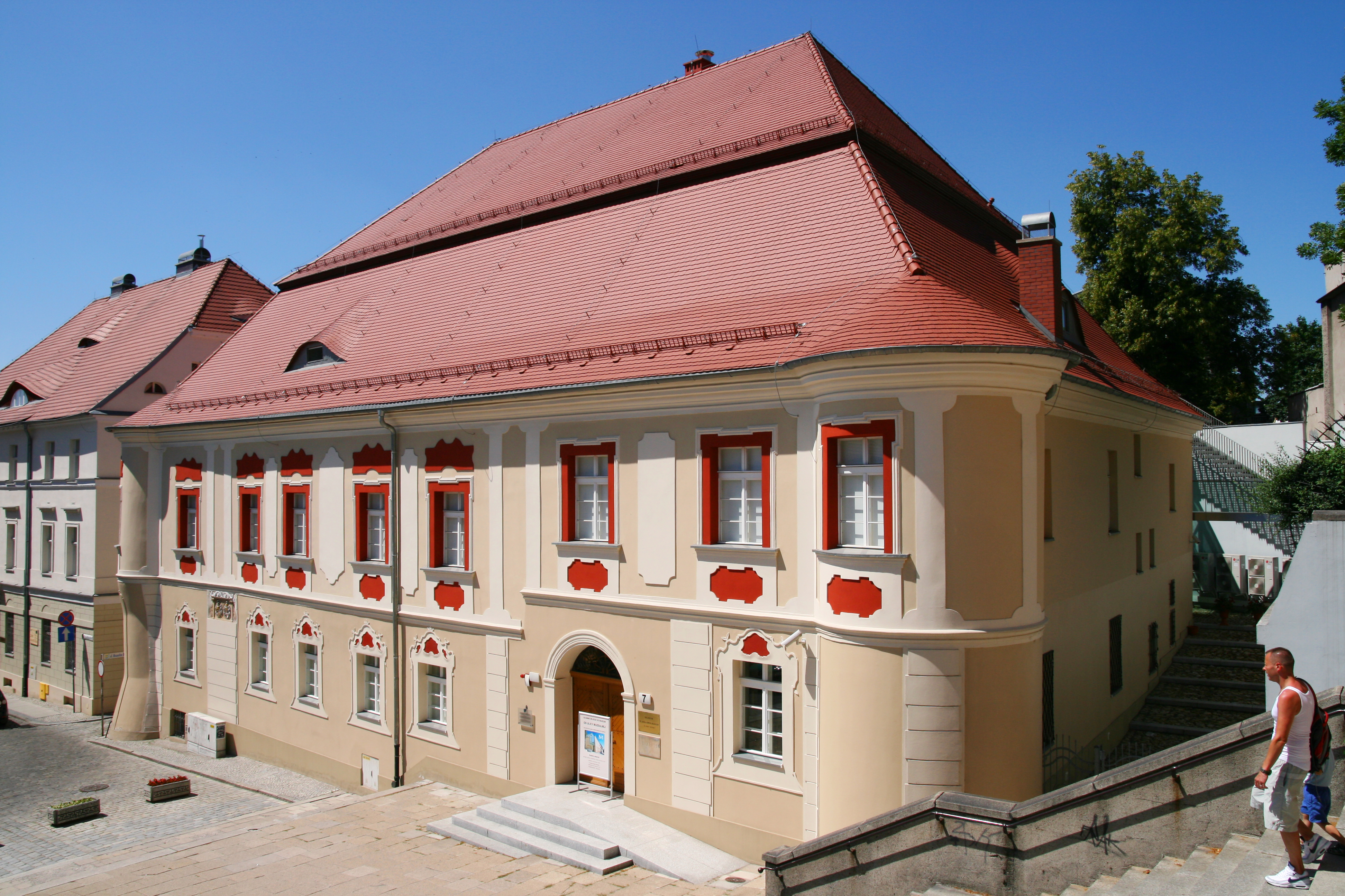 Budynek dawnego kolegium jezuickiego (obecnie Muzeum Śląska Opolskiego) w Opolu.